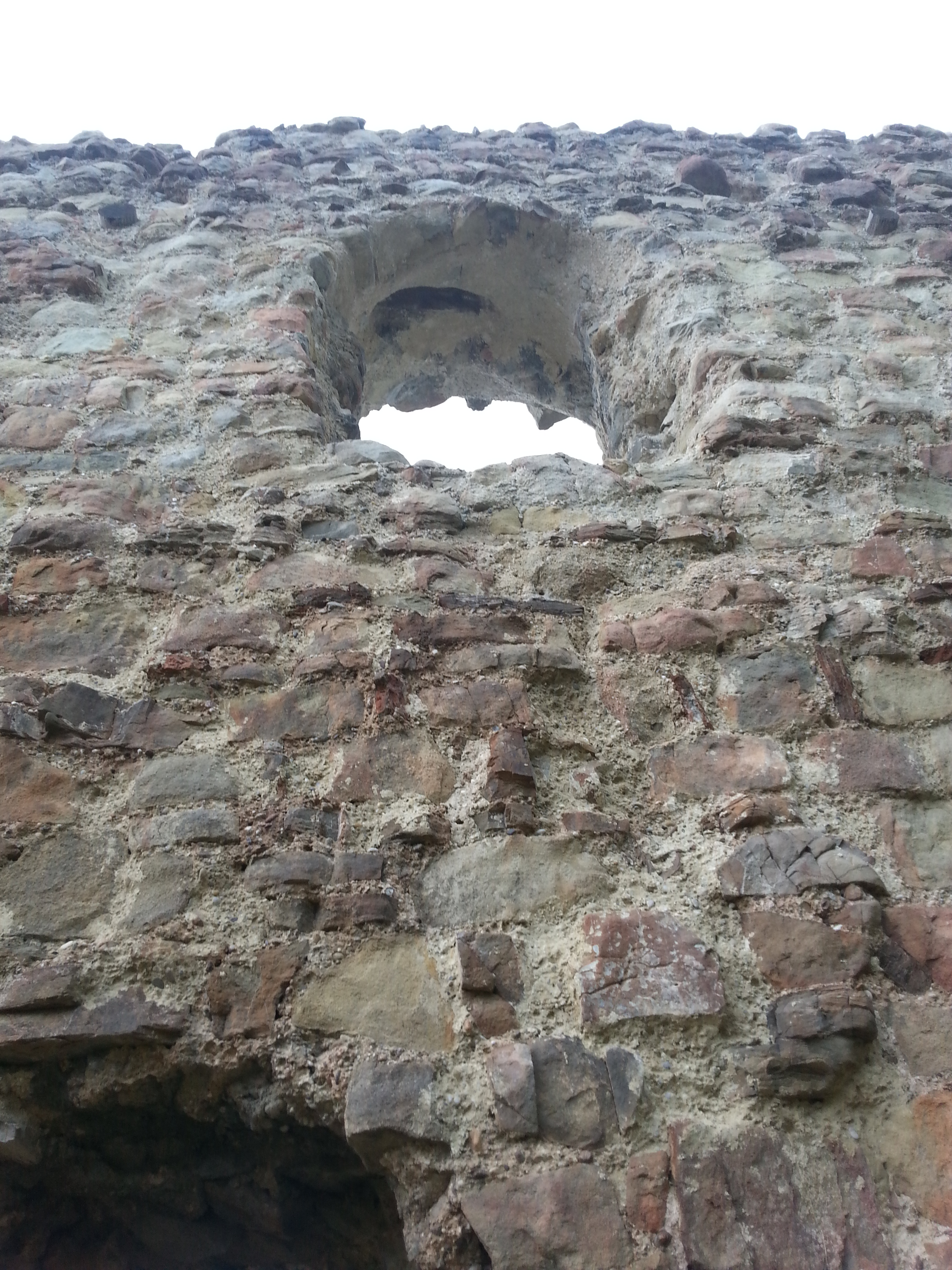 Burgus Zeiselmauer (Niederösterreich) 2018, Bogenfenster in der Südmauer.